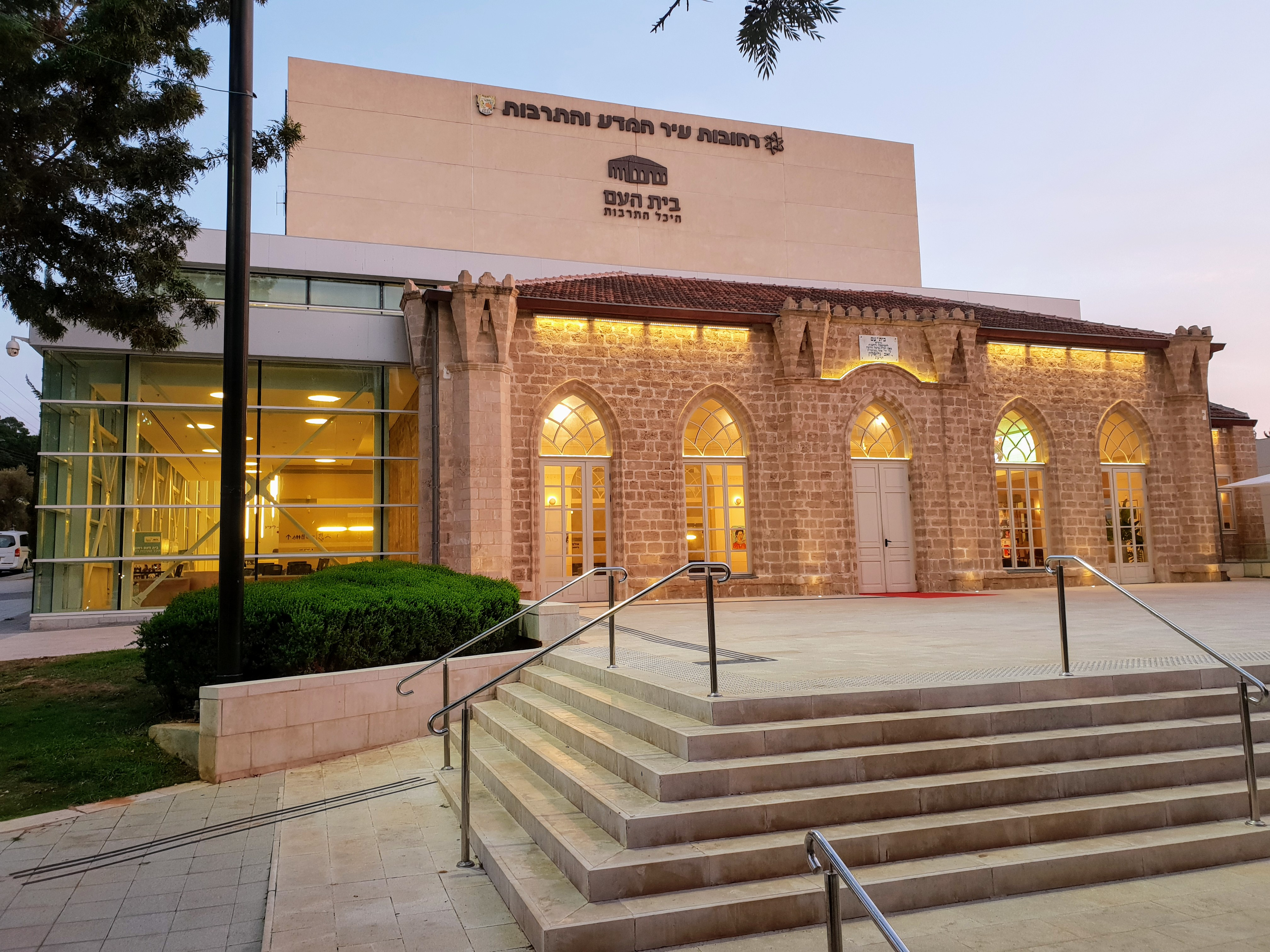 בית העם - שימש כמרכז החיים התרבותיים של המושבה בסגנון אקלקטי אופייני המזכיר טירה עתיקה ומשלב אלמנטים מחומת ירושלים.